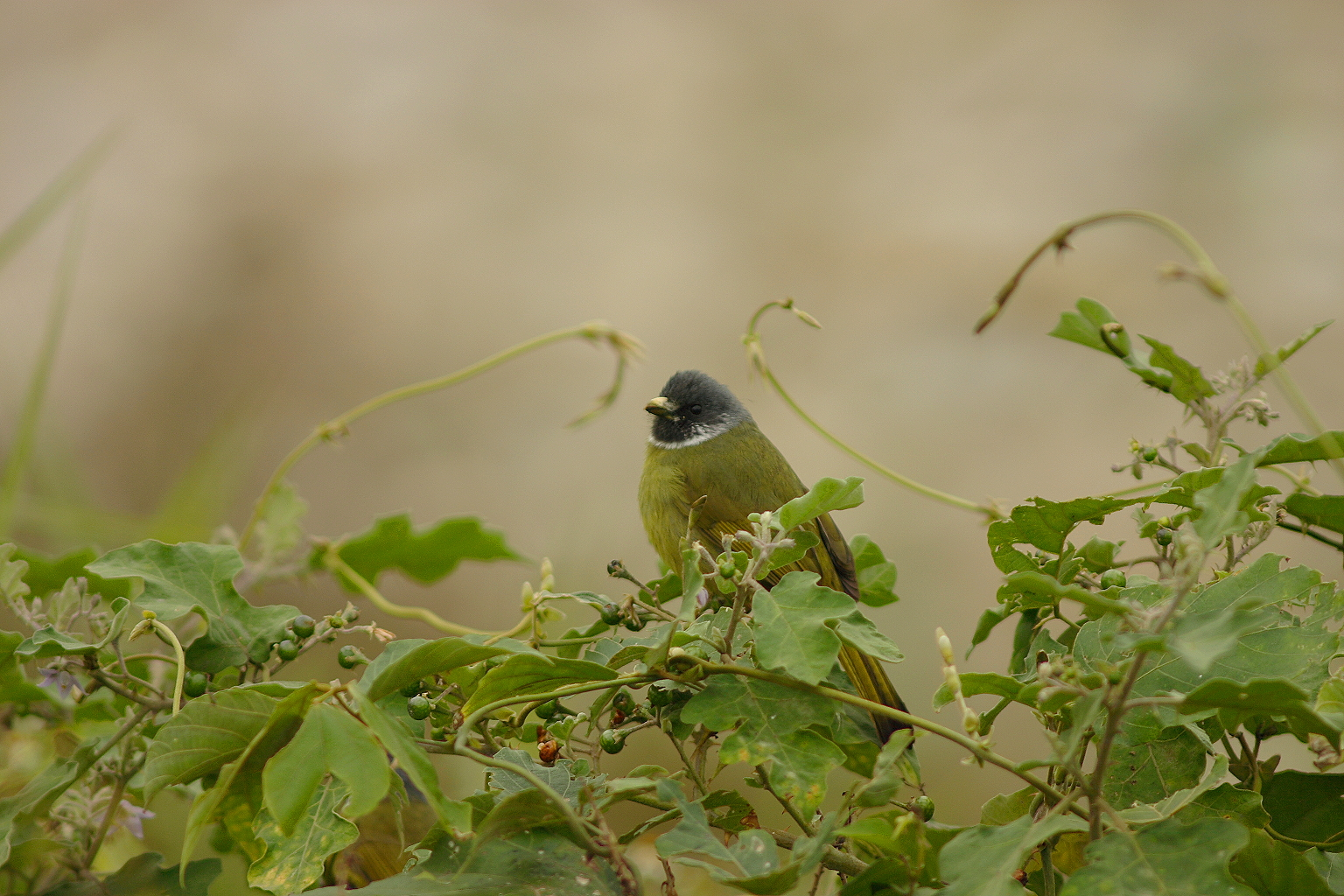 Collared Finchbill Spizixos semitorques. Taiwan.